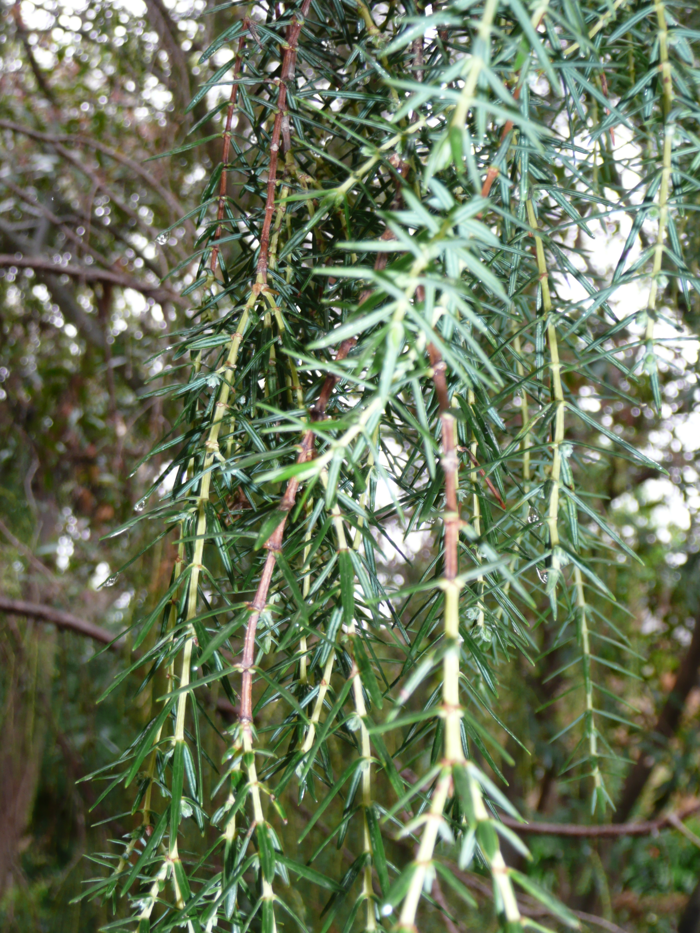 Juniperus cedrus in Jardín de Aclimatación de la Orotava Map: 28° 24' 39" N, 16° 32' 7" W